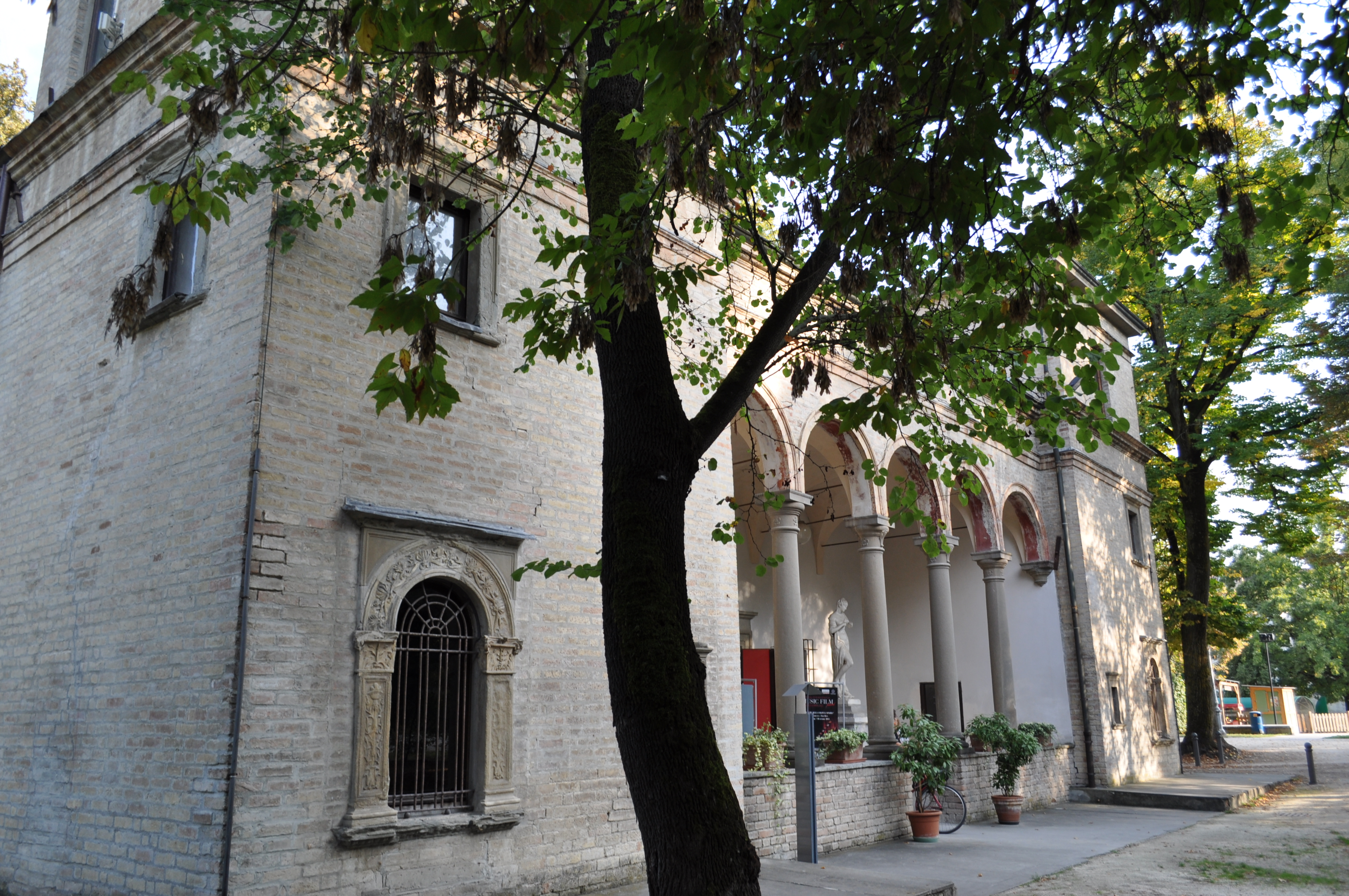 Si trova all'interno del Parco Ducale di Parma. L'edificio venne fatto costruire dai frati umiliati del monastero di San Michele in Bosco. Entrato in possesso di Scipione Dalla Rosa, nel 1526 venne acquistato da Gian Galeazzo Sanvitale, conte di Fontanellato, che nel 1547 lo trasmise al figlio Eucherio. Eletto vescovo di Viviers, Eucherio si trasferì in Francia e nel gennaio 1561 cedette il casino e il terreno circostante al duca Ottavio Farnese. L'edificio, tradizionalmente attribuito a Giorgio da Erba e a Gian Francesco d'Agrate, è di dimensioni piuttosto modeste e si sviluppa su una pianta ad H, con quattro torri angolari che, nella parte frontale, sono collegate da un loggiato con cinque arcate. Sull'ingresso è incisa l'epigrafe DII FACIENTES ADIUVANT. All'interno si conservano alcuni affreschi di un artista anonimo della scuola del Bertoja o di Giovanni Baglione, una Madonna col Bambino attribuita a un giovane Parmigianino e una cappella decorata dal pittore cappuccino Cosimo da Castelfranco con le Storie della Vergine.